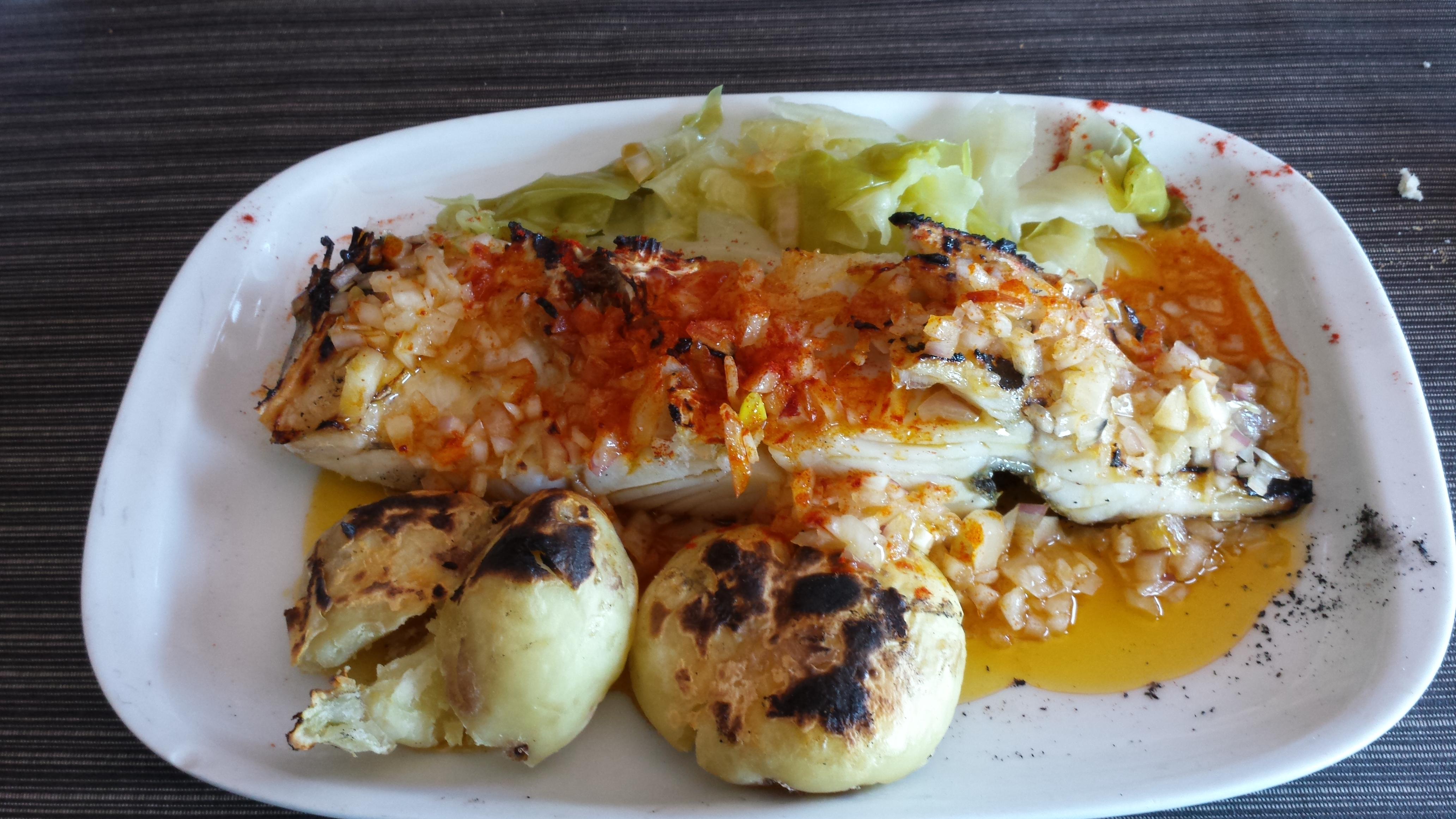 Bacalao a la Brasa, Miranda do Douro, Portugal.